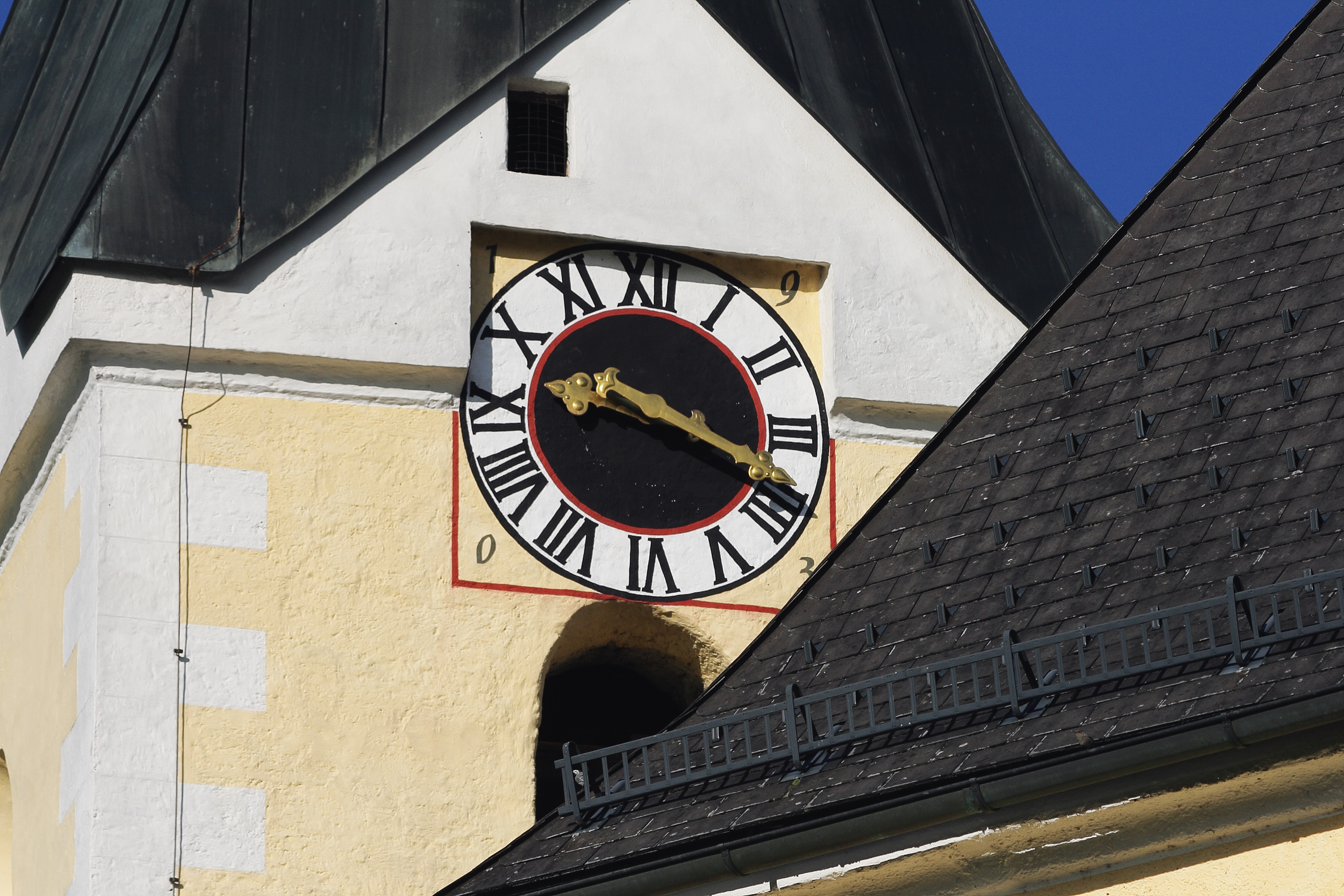 Die Turmuhr der Leonsteiner Pfarrkirche